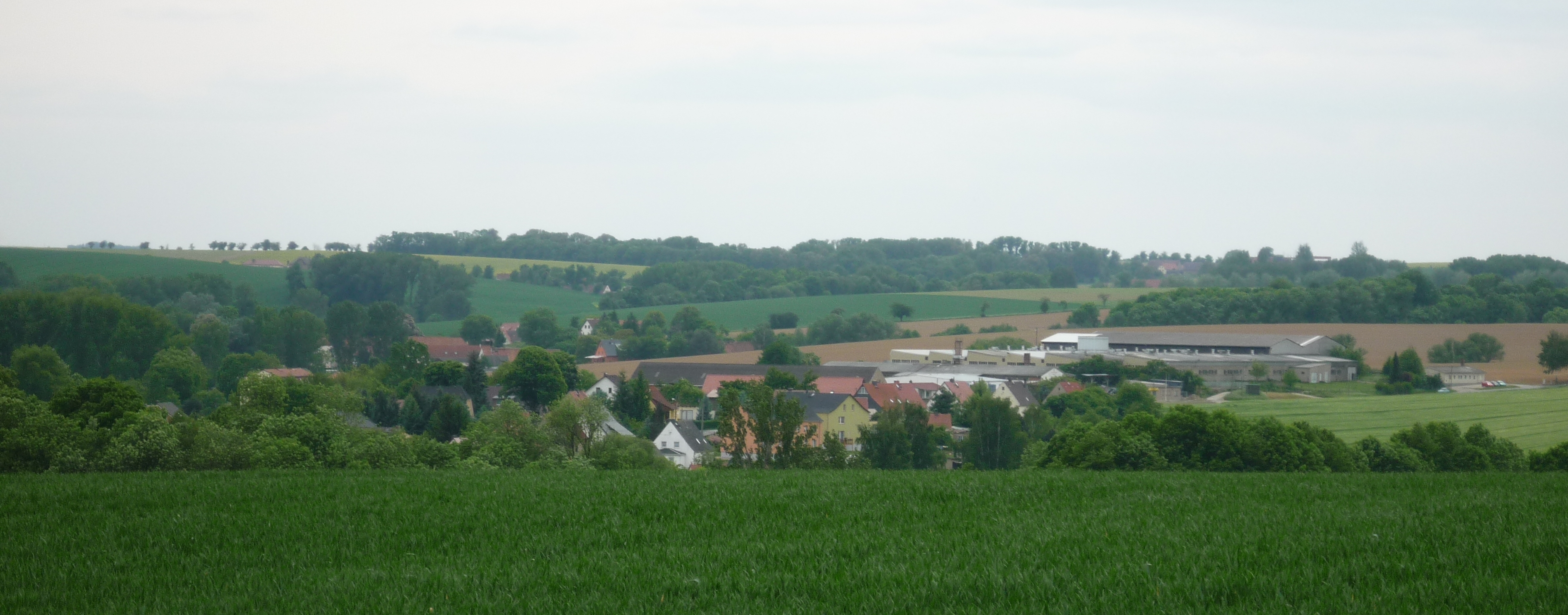 Blick auf Niederjahna und Jahna-Löthain, Ortsteile von Käbschützteil.